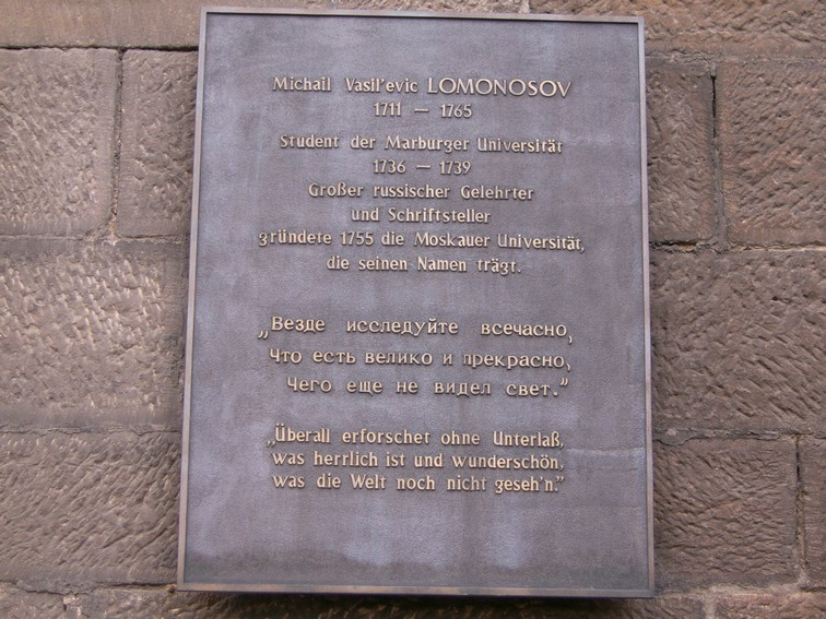 Michail Wassiljewitsch Lomonossow-Gedenktafel der Philipps-Universität